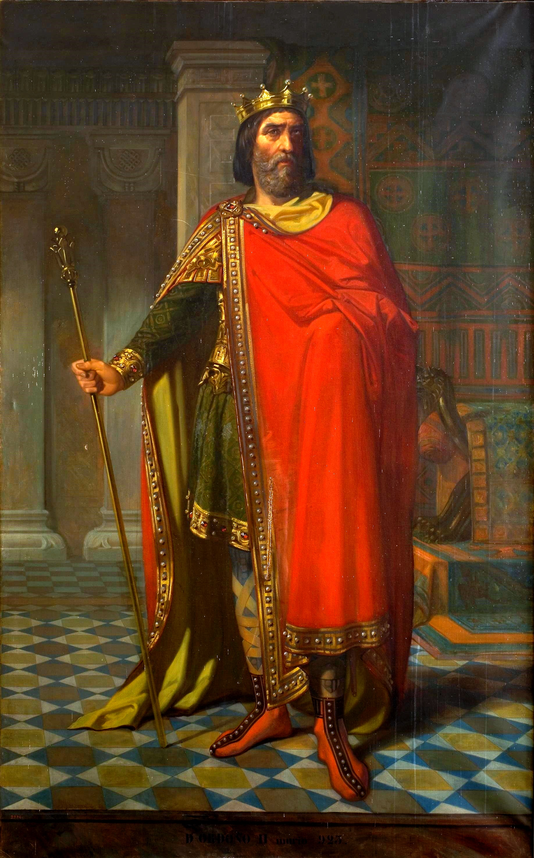 Retrato imaginario del rey Ordoño II de León (c.871-924). Fue hijo del rey Alfonso III de Asturias y de la reina Jimena de Asturias. Sometió a su autoridad los territorios del reino leonés y combatió exitosamente contra los musulmanes, que aún dominaban la mayor parte de la Península Ibérica. Su reinado supuso el tránsito tácito y tranquilo del reino de Asturias al reino de León, con la sede regia ya establecida definitivamente en la ciudad de León, en cuya catedral fue sepultado.